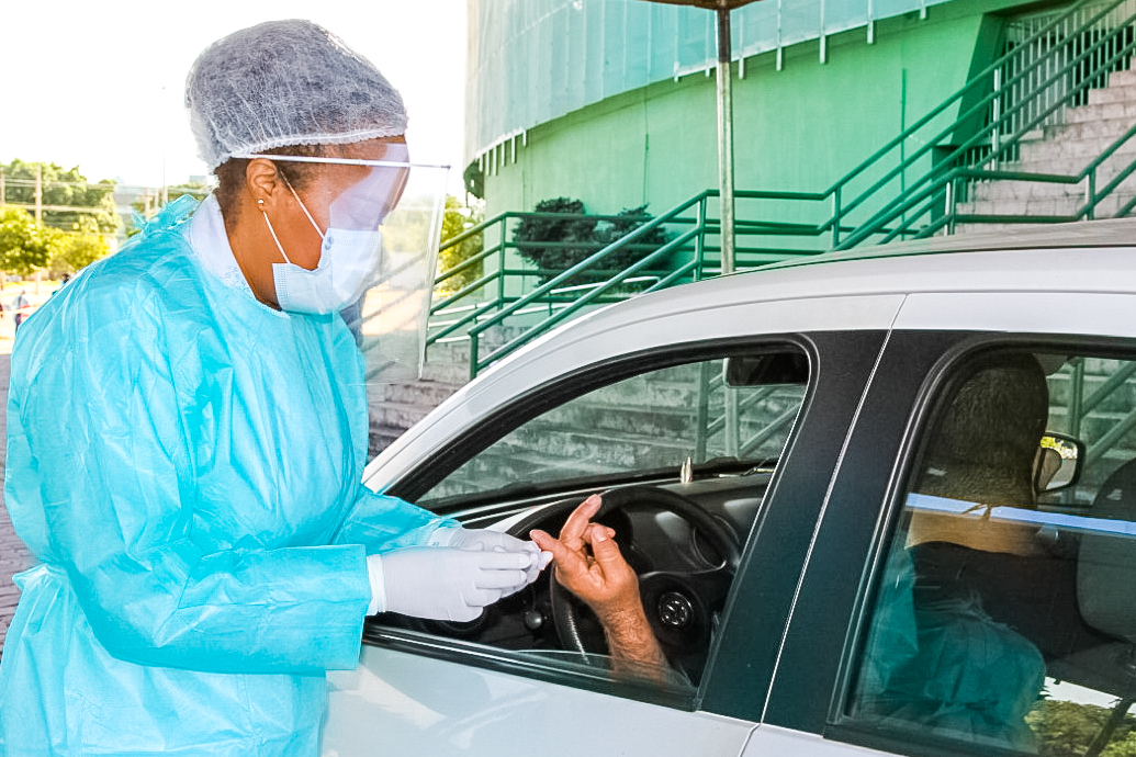 Já são nove dias de testagem em massa no Distrito Federal para a Covid-19. A ação da Secretaria de Saúde montou dez postos, em dez regiões administrativas, para que a população possa fazer o teste rápido para a doença causada pelo novo coronavírus. Nesta segunda-feira(04/04), 4.113 testes foram realizados ao lado do Estádio Bezerrão no Gama. Foto: Divulgação